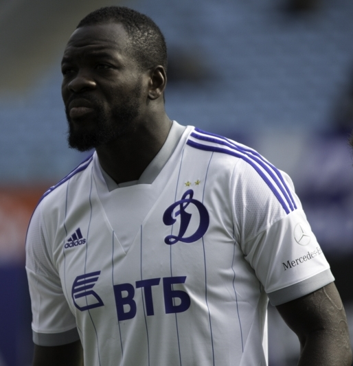 Кристофер Самба в 2014 году.